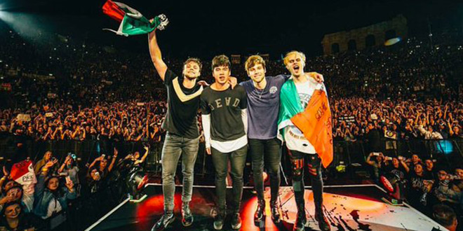 Il gruppo in concerto a Verona nel 2016 durante il tour mondiale Sounds Live Feels Live